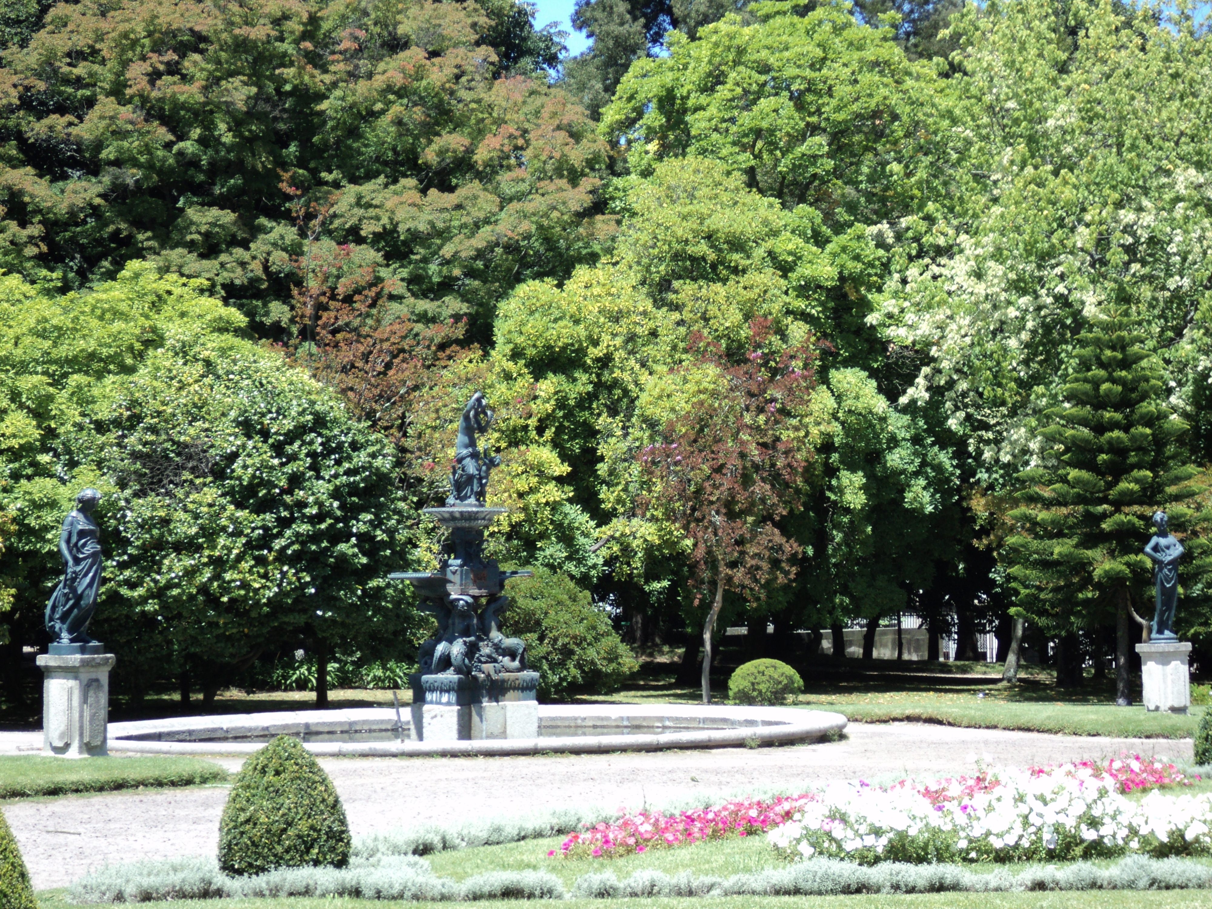 Jardins do Palácio de Cristal, na cidade do Porto, em Portugal.